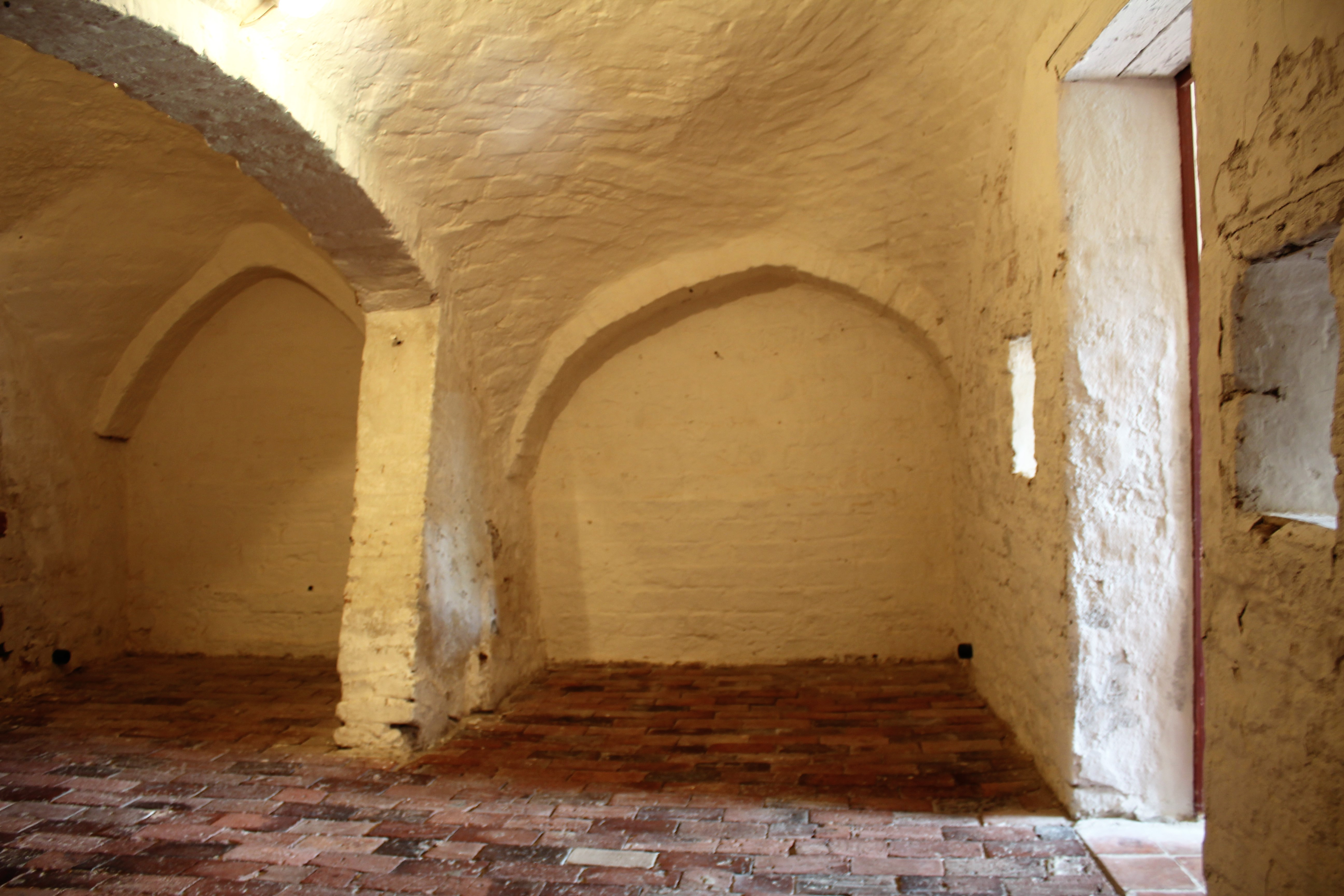 Steinhaus Bunderhee, Landkreis Leer, Ostfriesland, Deutschland